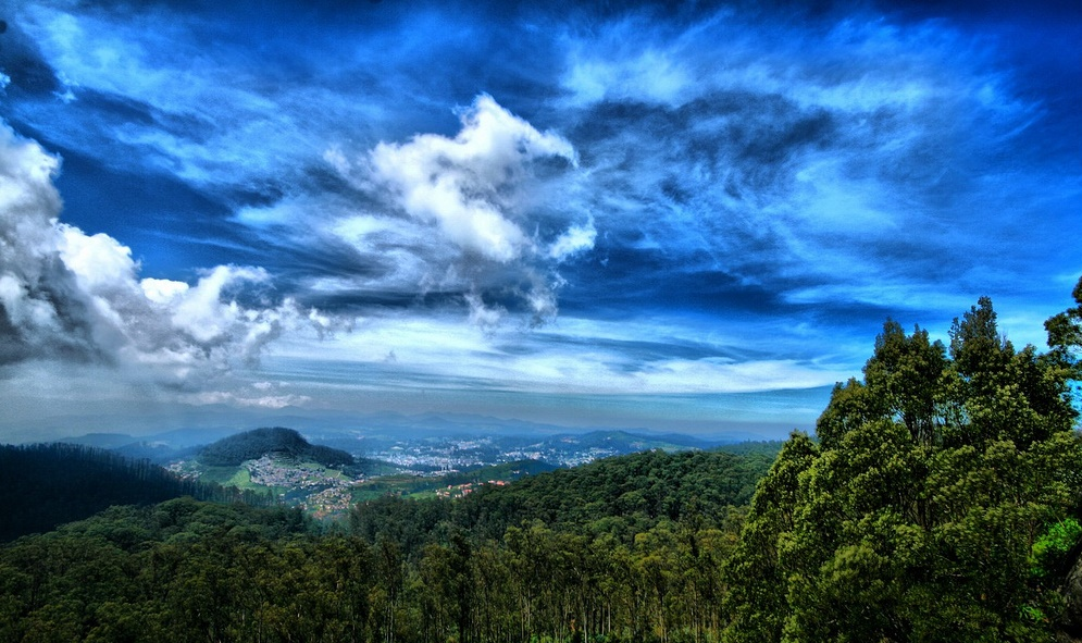 Doddabetta landscape